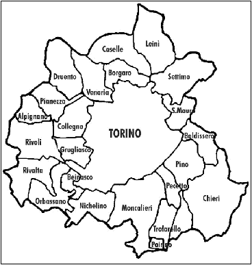 Area metropolitana di Torino - prima cintura Licensing Categoria:Immagini esclusivamente in GNU FDL